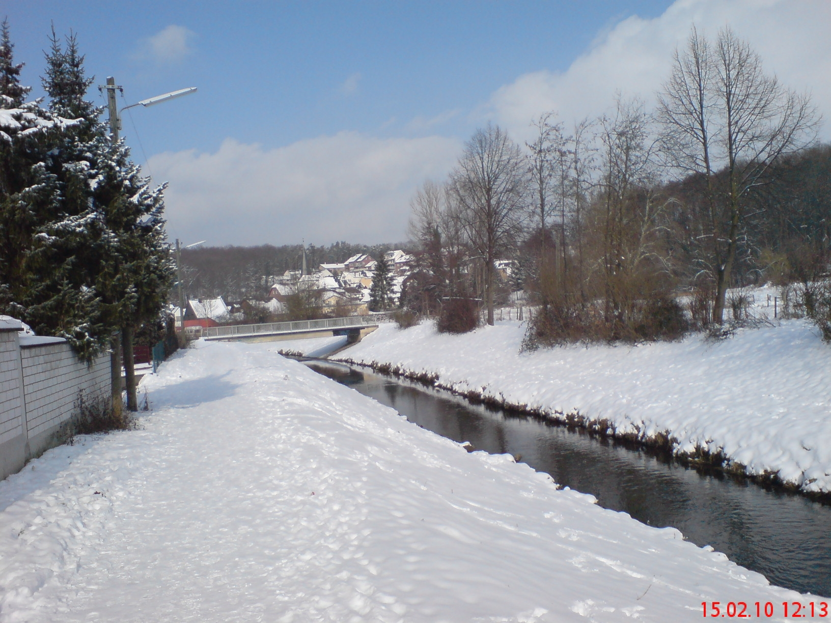 Swistbach in Metternich